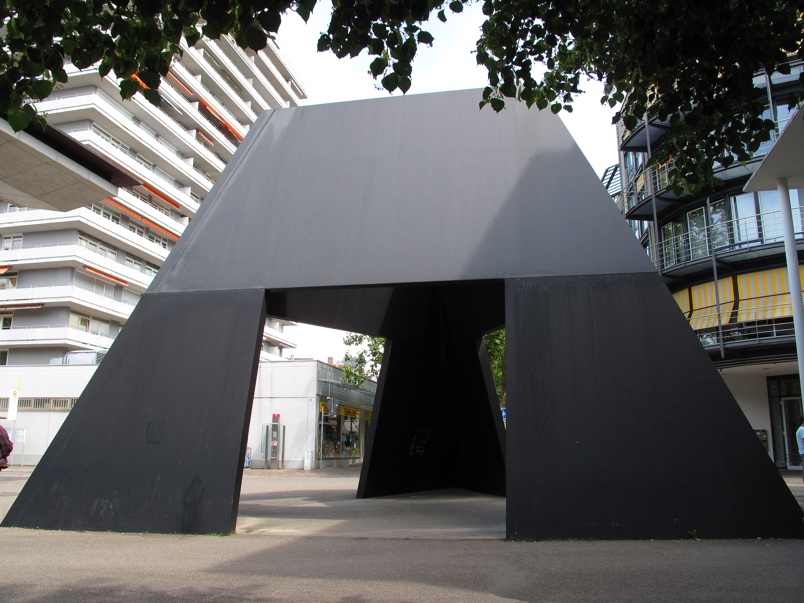 Bruce Nauman, Truncated Pyramid Room, 1982-98, - Deutschland, Baden-Württemberg, Lörrach, Skulpturenweg